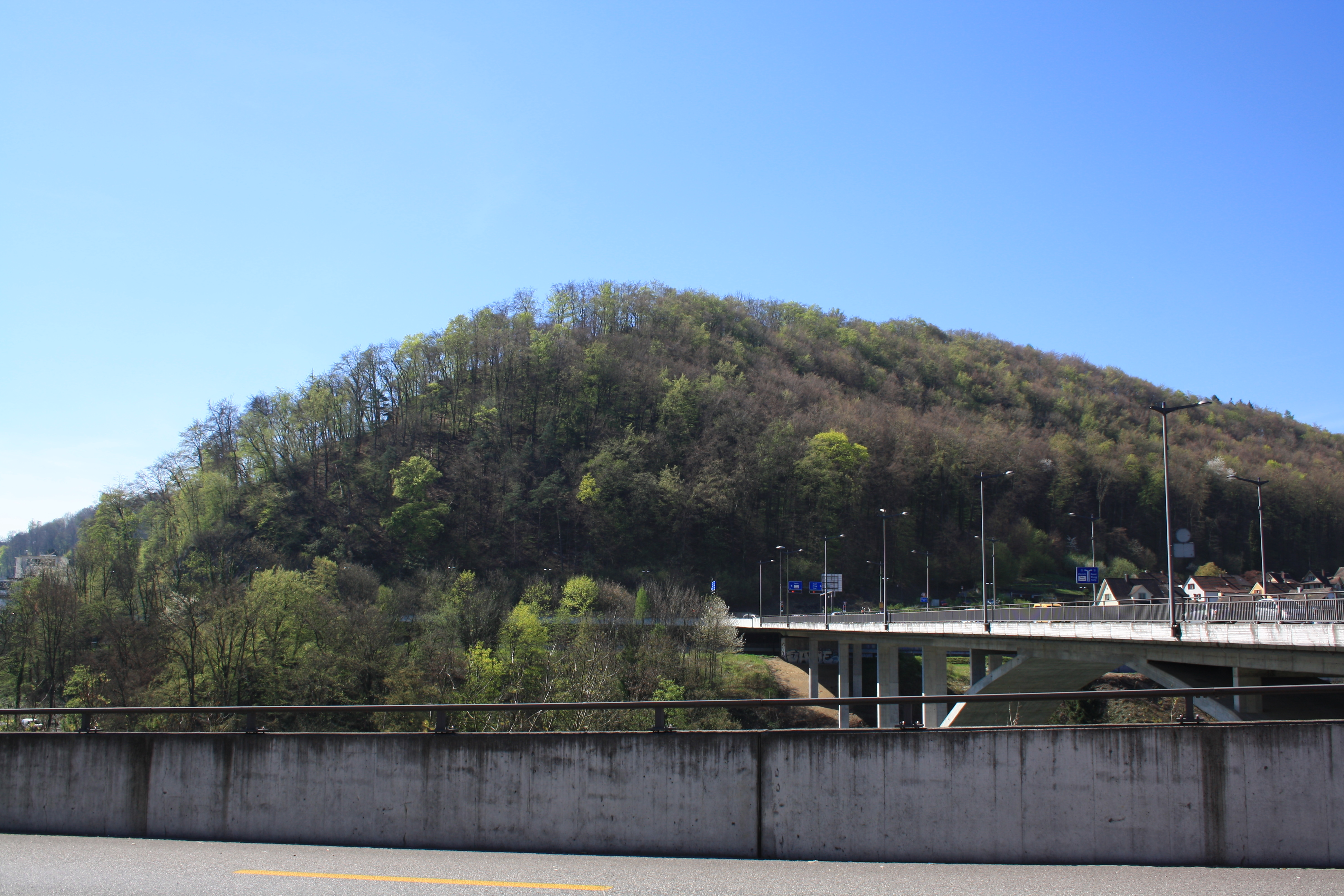 Martinsberg und neue Brücke